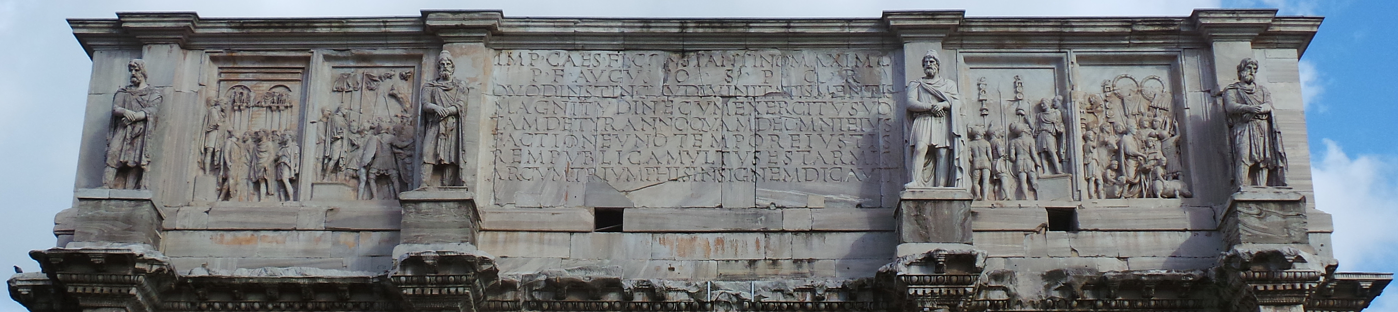 Dedikationsinschrift